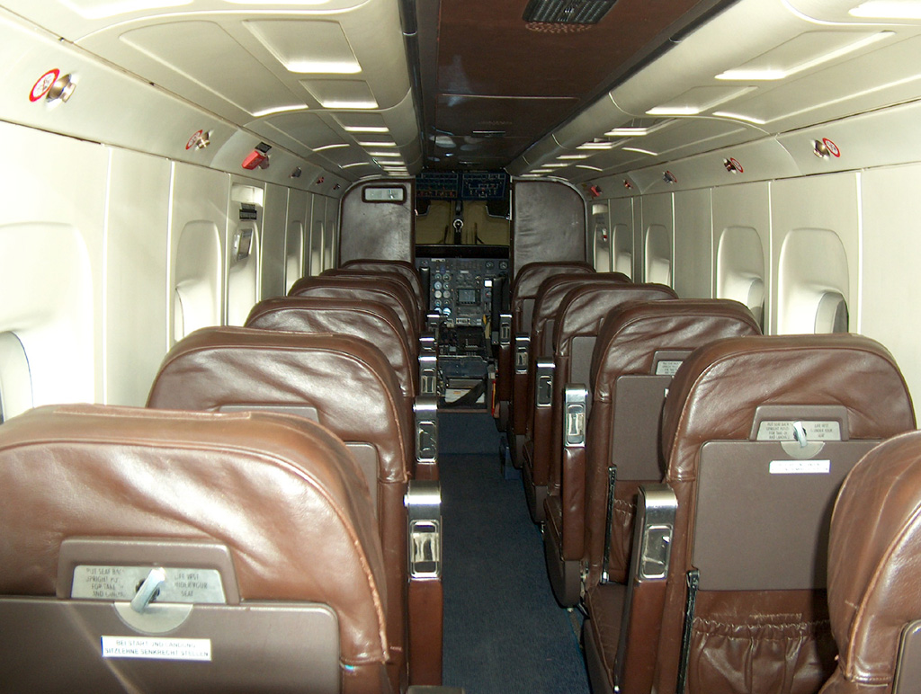 Aircraft: Dornier Do 228-200 Airline: Luftfahrtgesellschaft Walter mbH (LGW) Registration: D-ILWB Location: Dortmund Airport, Germany